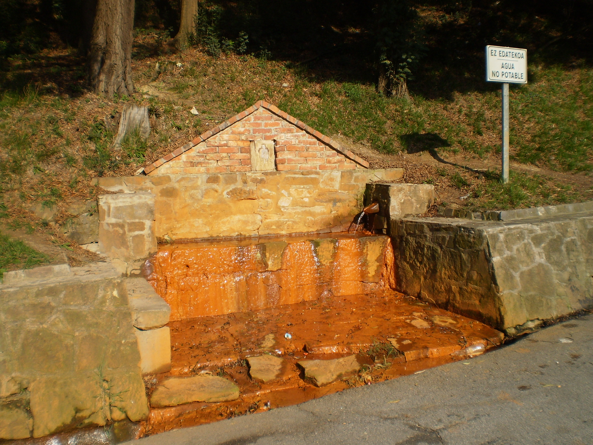 Fuente de agua ferruginosa en la cuesta de Santo Domingo (Bilbao)